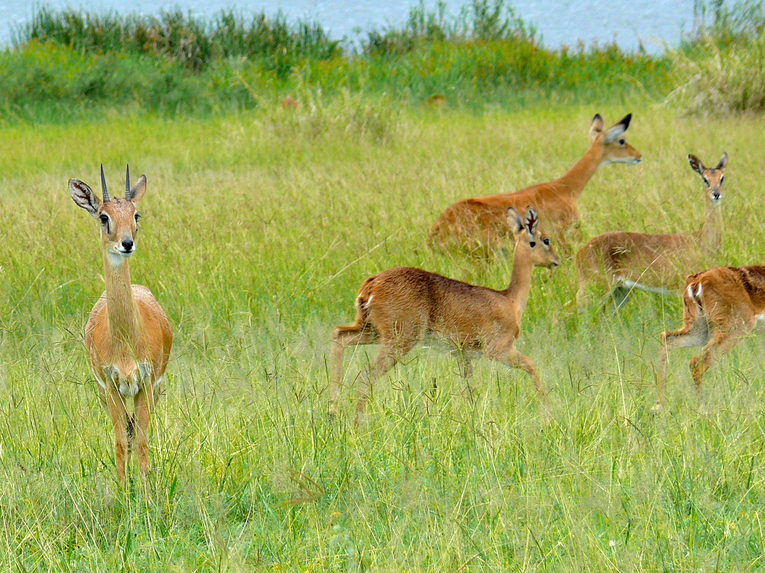 Murchison Falls NP, UGANDA